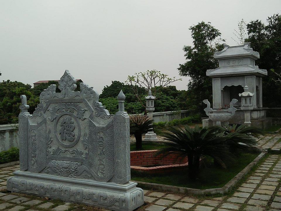 Lăng mộ Thượng tướng quân Doãn Nỗ (1393-1439), khai quốc công thần nhà Lê sơ, tại xã Phương Chiểu thành phố Hưng Yên tỉnh Hưng Yên Việt Nam.